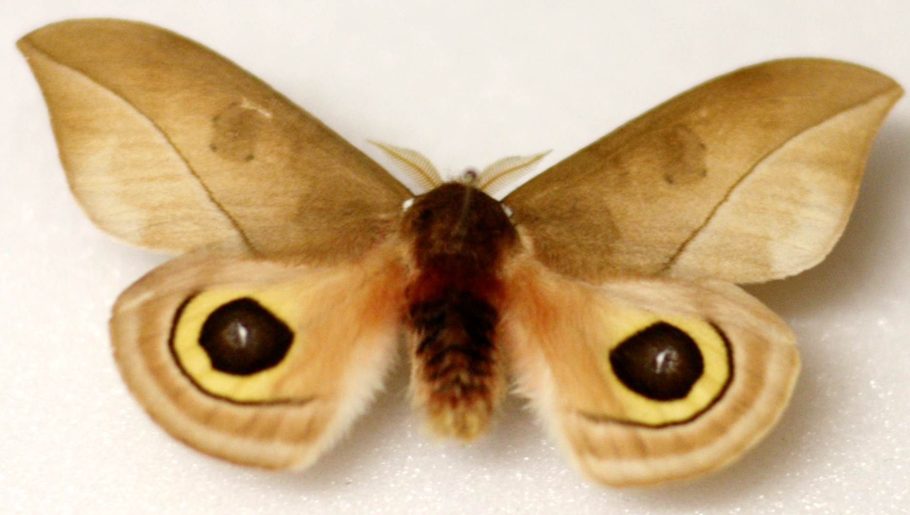 Naturkundliche Sammlung Übermaxx Überseenuseum Bremen; Schmetterlinge und andere Automeris zozine Druce, 1886 Mexico